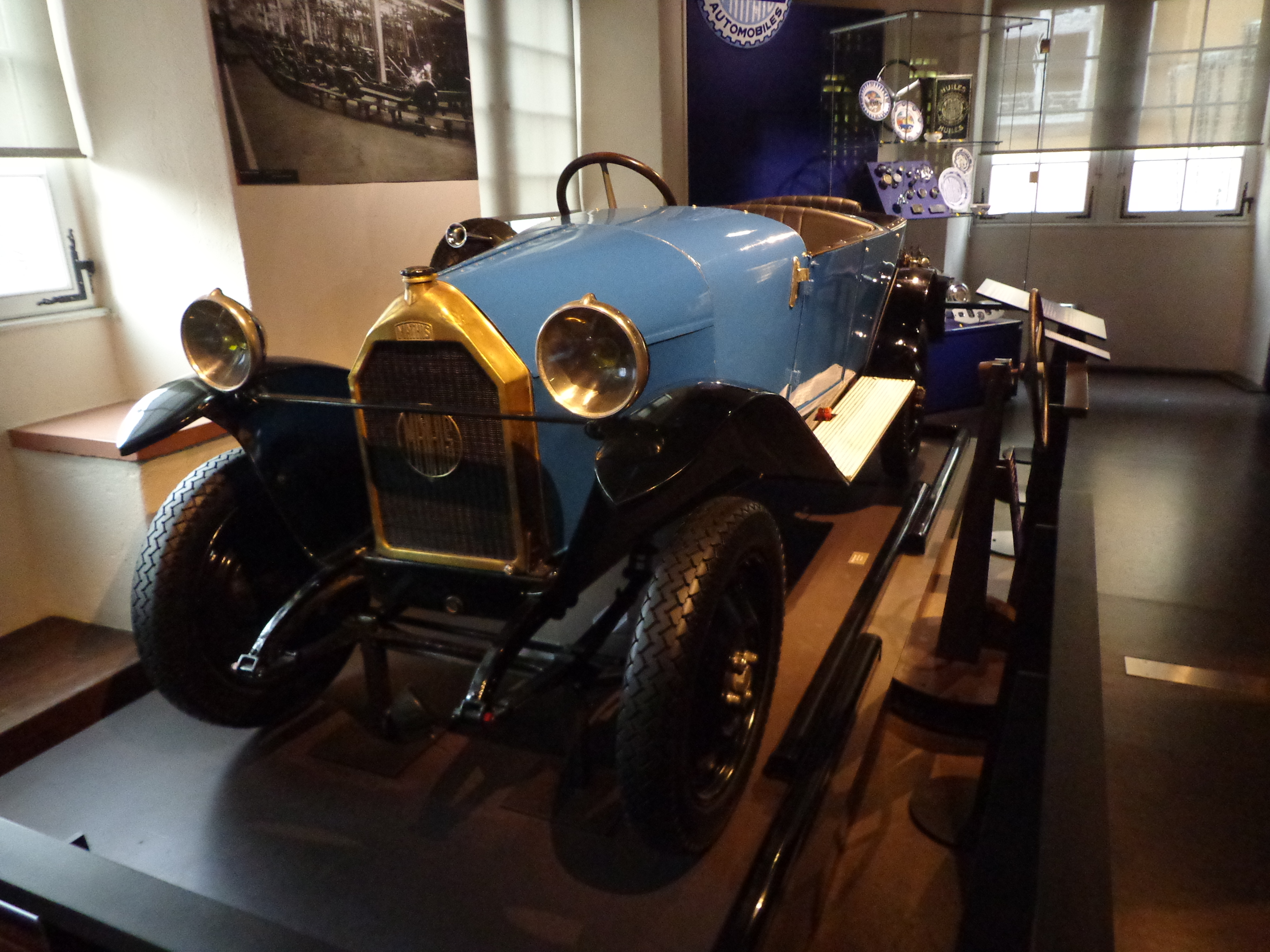 Pièces mécaniques d'origine, carrosserie et garniture en partie modernes